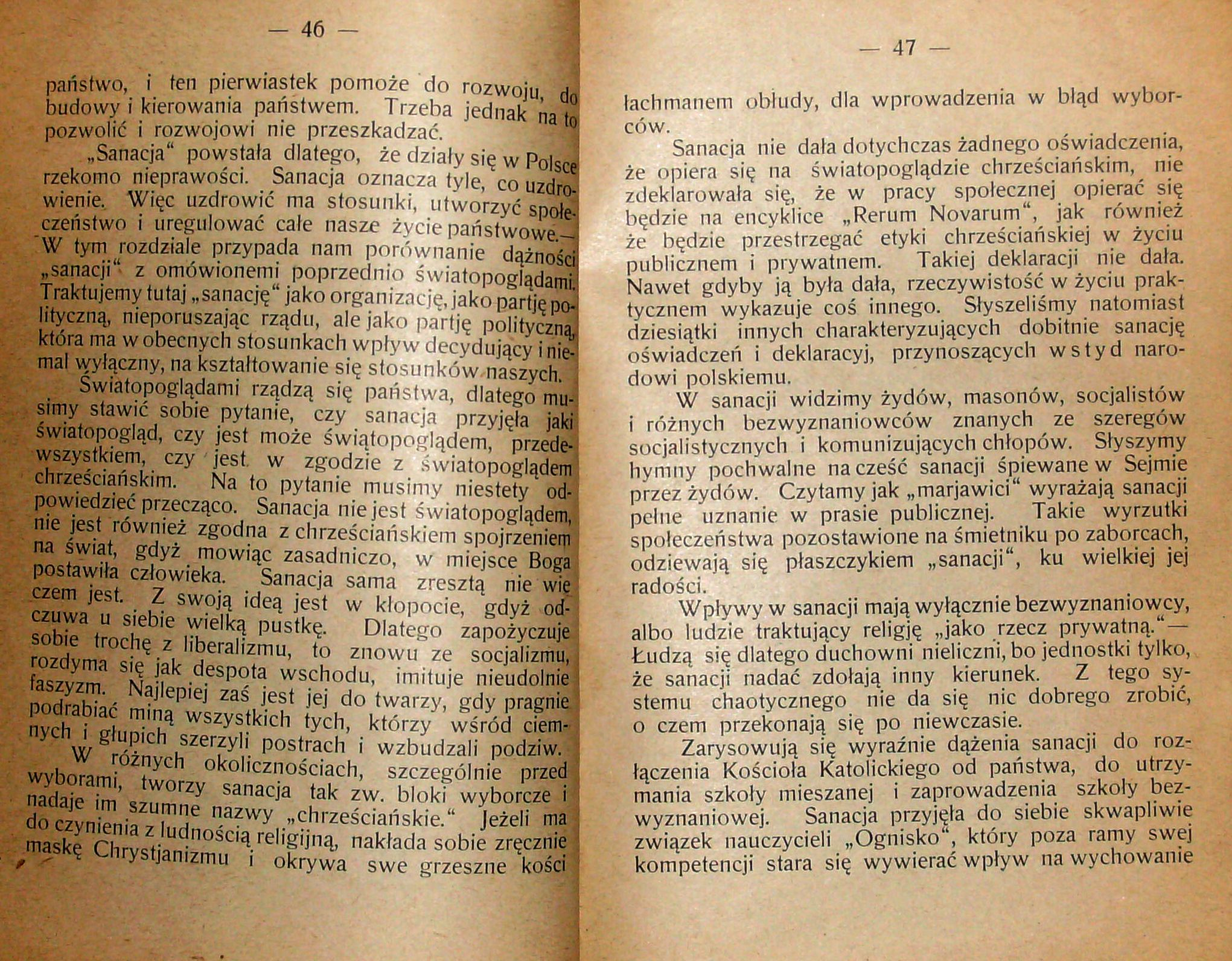 Stanisław Krzyżowski, Rozmyślania w czterdziestą rocznicę encykliki „Rerum novarum”, wydanej 15 maja 1891 r. przez papieża Leona XIII, Pszczyna 1931